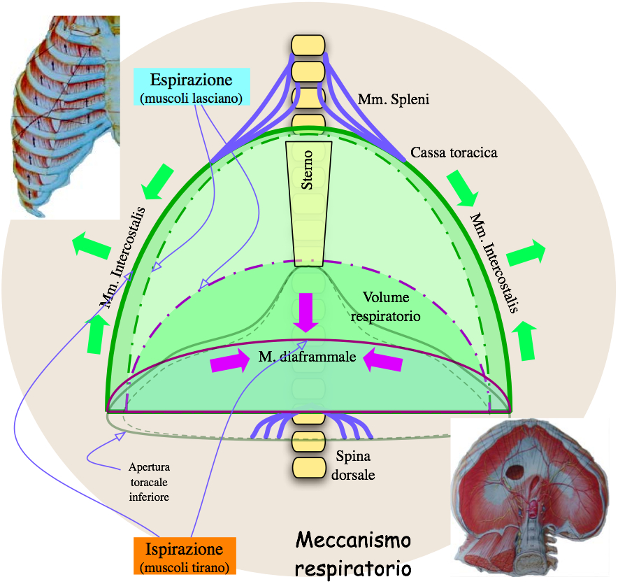 Grafica: Medicina: Respirazione: Meccanismo respiratorio: Grafica: Medicina: Apparato respiratorio: Anatomia, fisiologia: Meccanismo respiratorio: ispirazione, espirazione, torace, diaframma, muscoli, intercostali, spleni, volume respiratorio, contrazione, distensione, forze